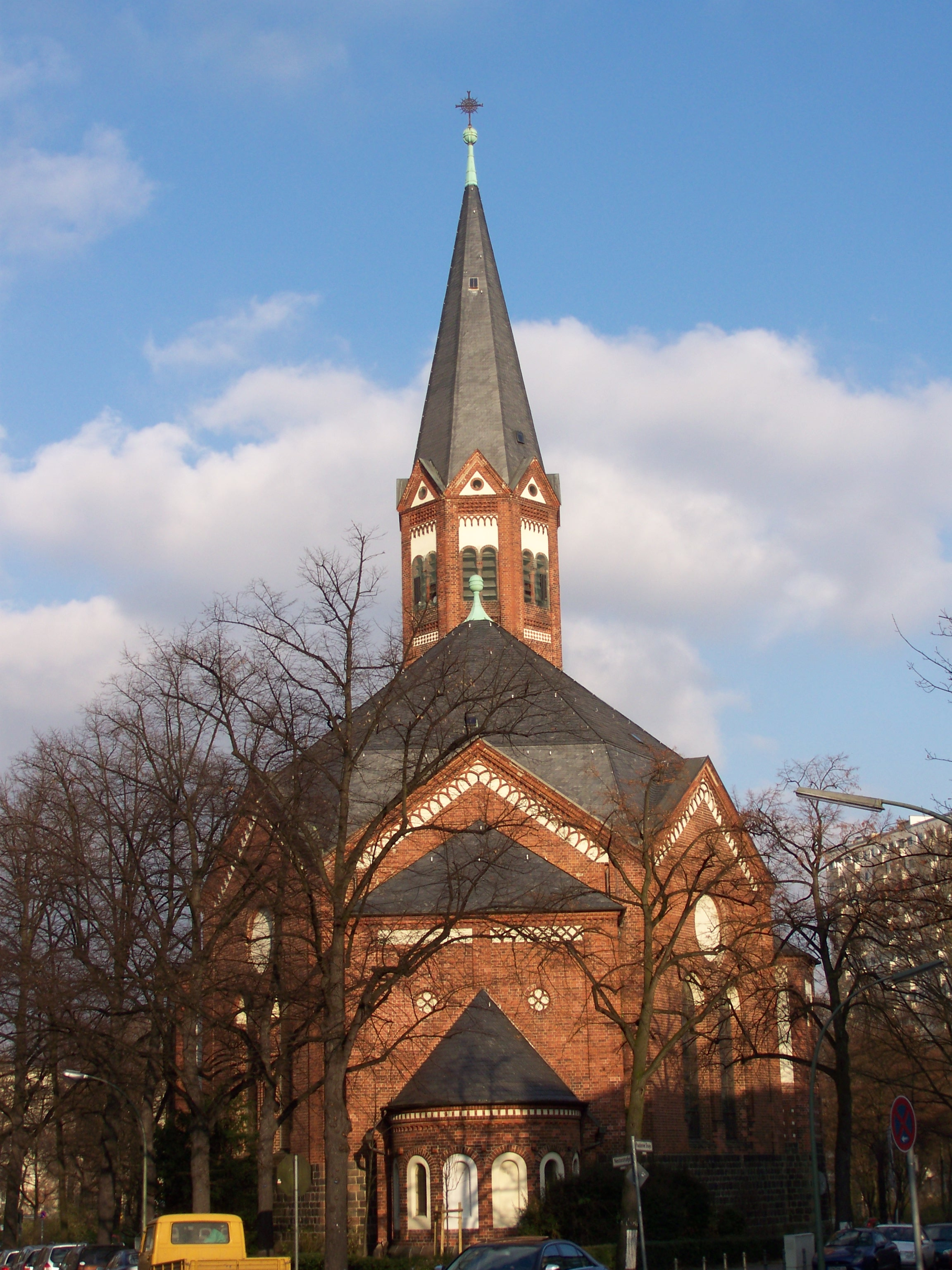 Berlin, Hochmeisterkirche, Ansicht Chor (2008-11-28)